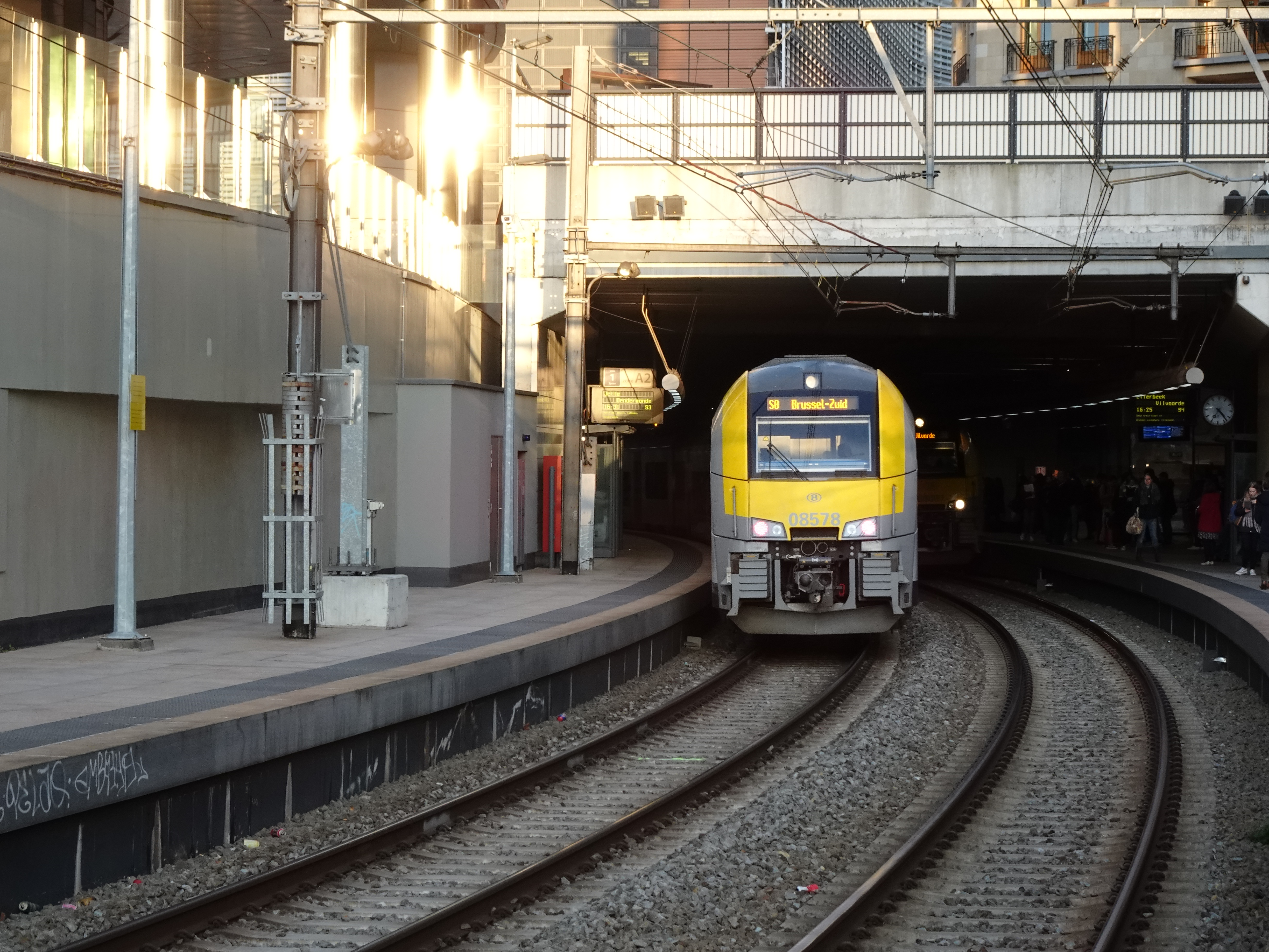 Train S8 en gare de Schuman, voie 1. Au loin, le S4 2186 à destination de Vilvorde.